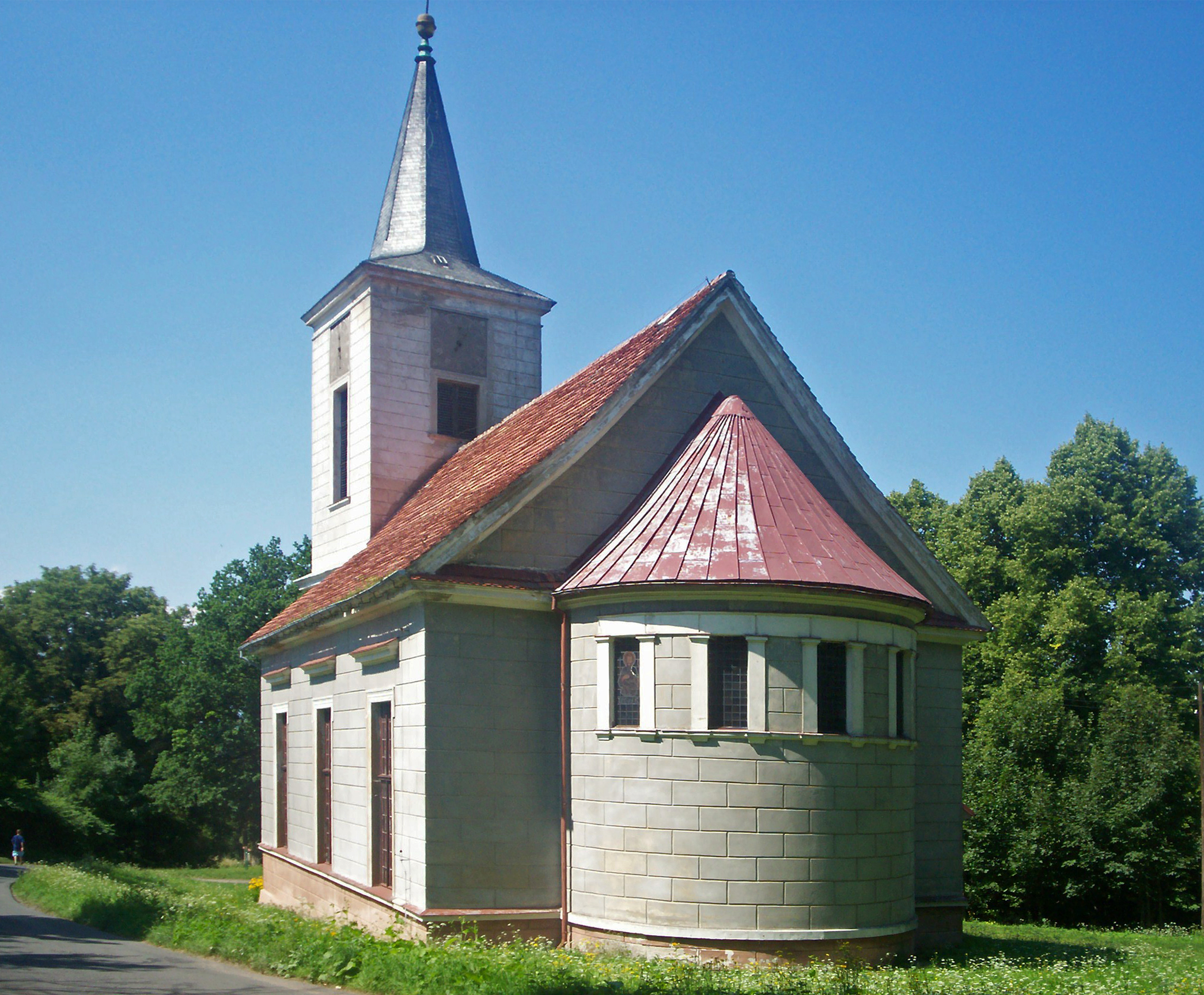 Miedzianka, kościół pw. Św. Jana Chrzciciela.